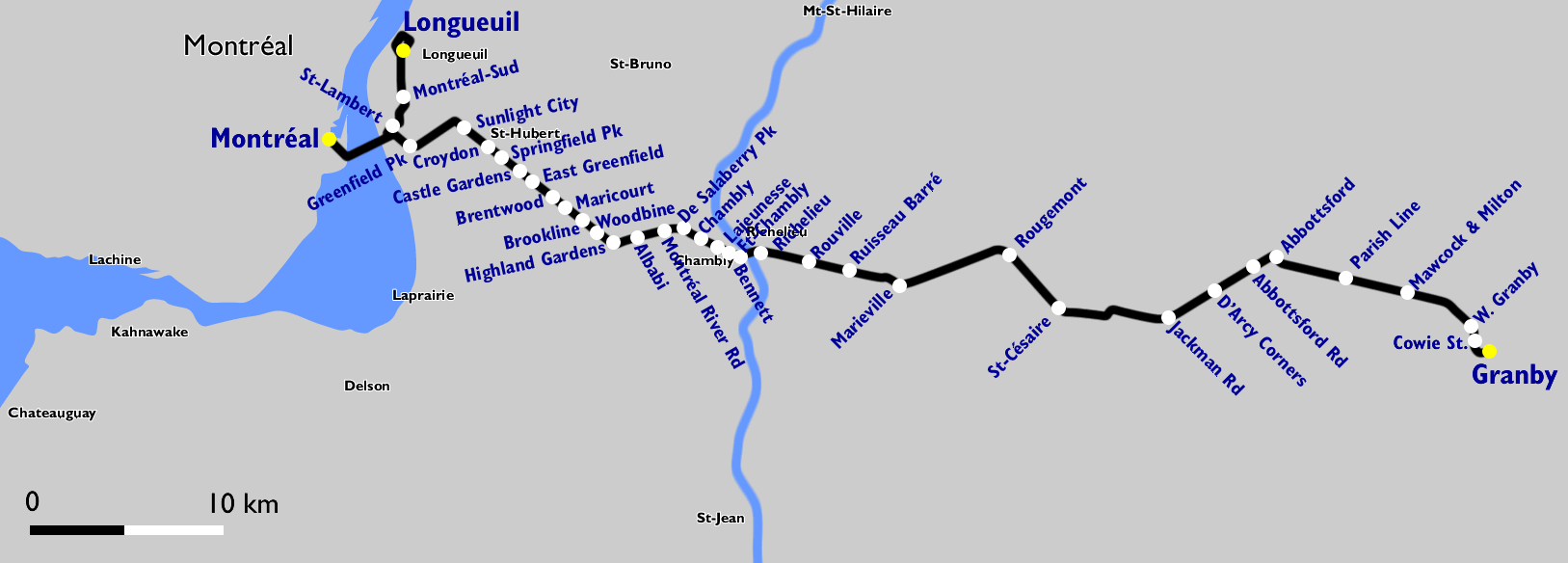 Carte du réseau du Montréal & Southern Counties.